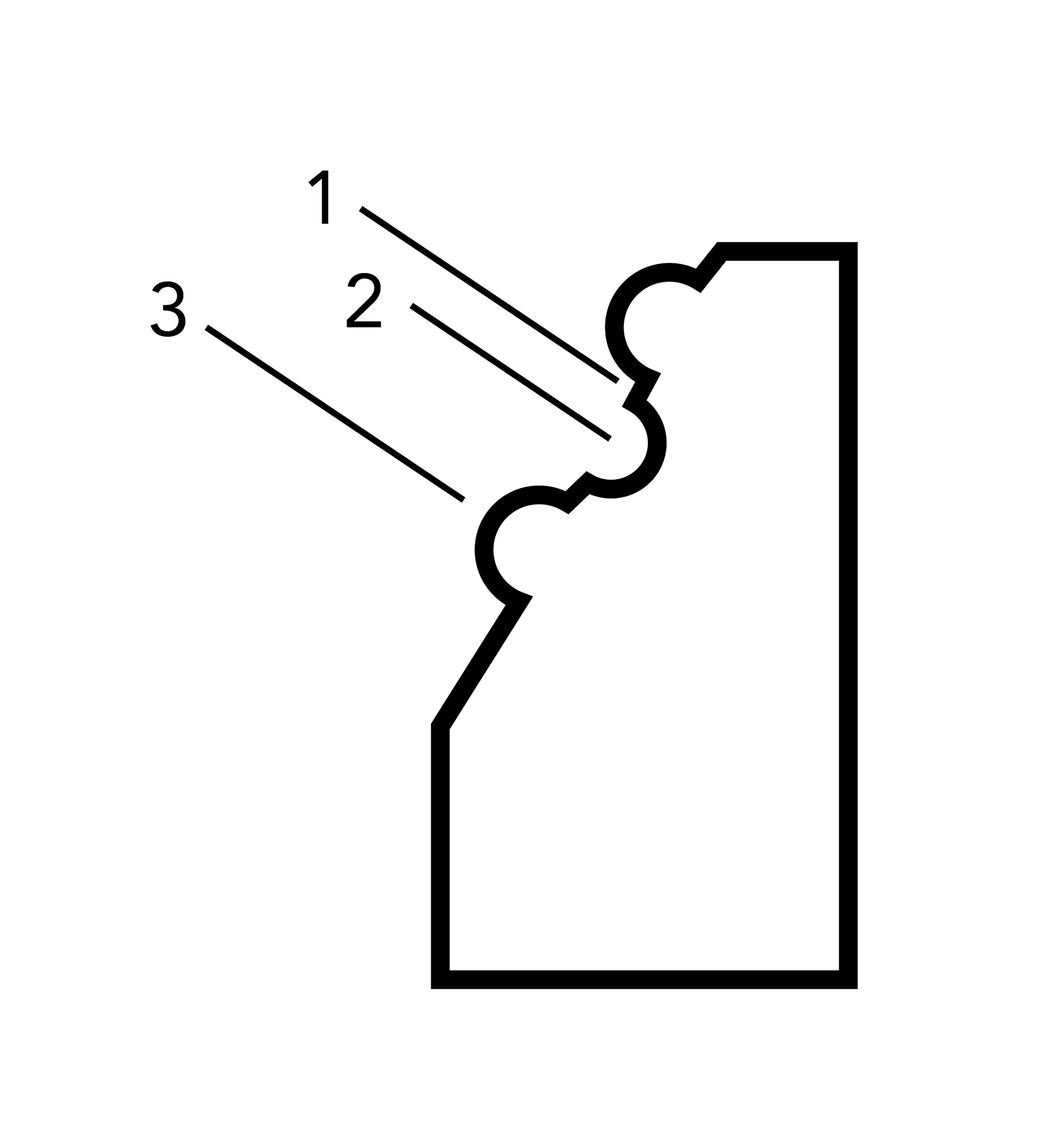 Süvarihv